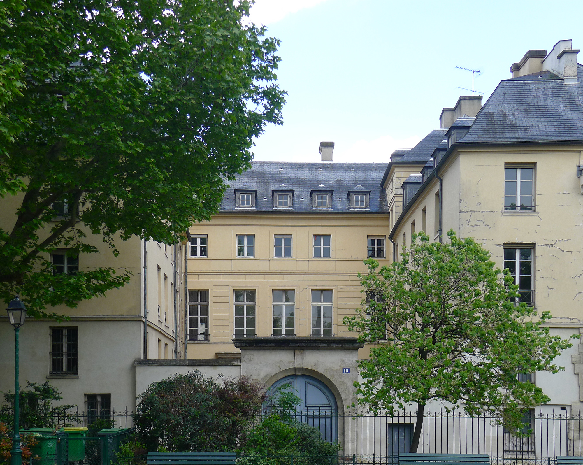 Hôtel de Vigny (InscritInscrit) - n°10 rue du Parc-Royal - Paris III .